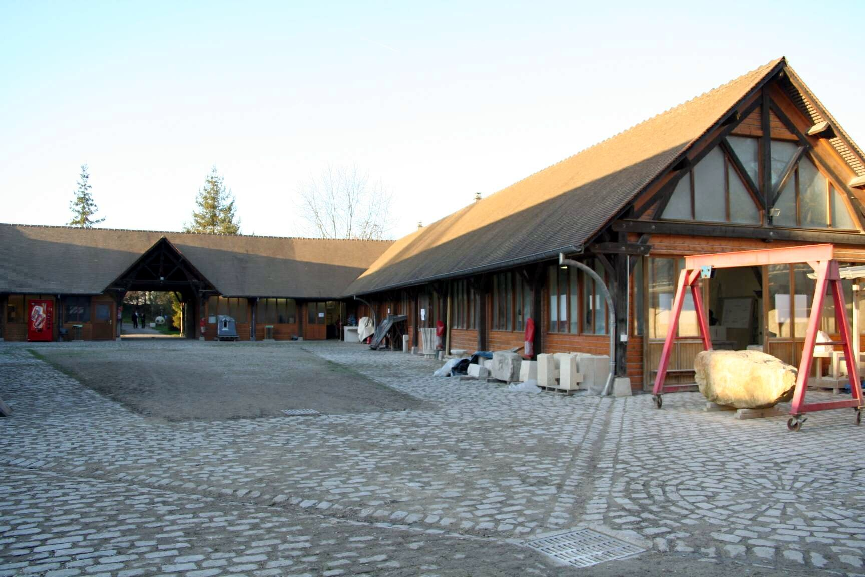 Ateliers des compagnons du Devoir à Épône, Yvelines (France)